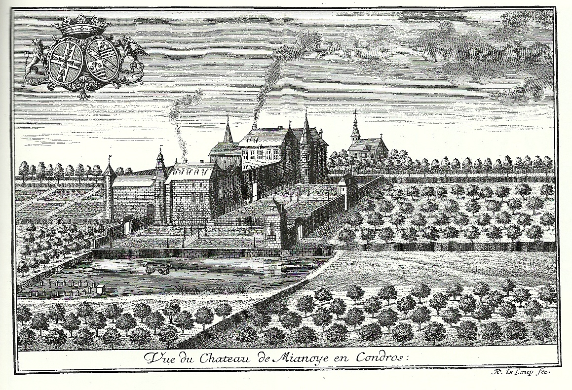 Chateau de Mianoye premier état